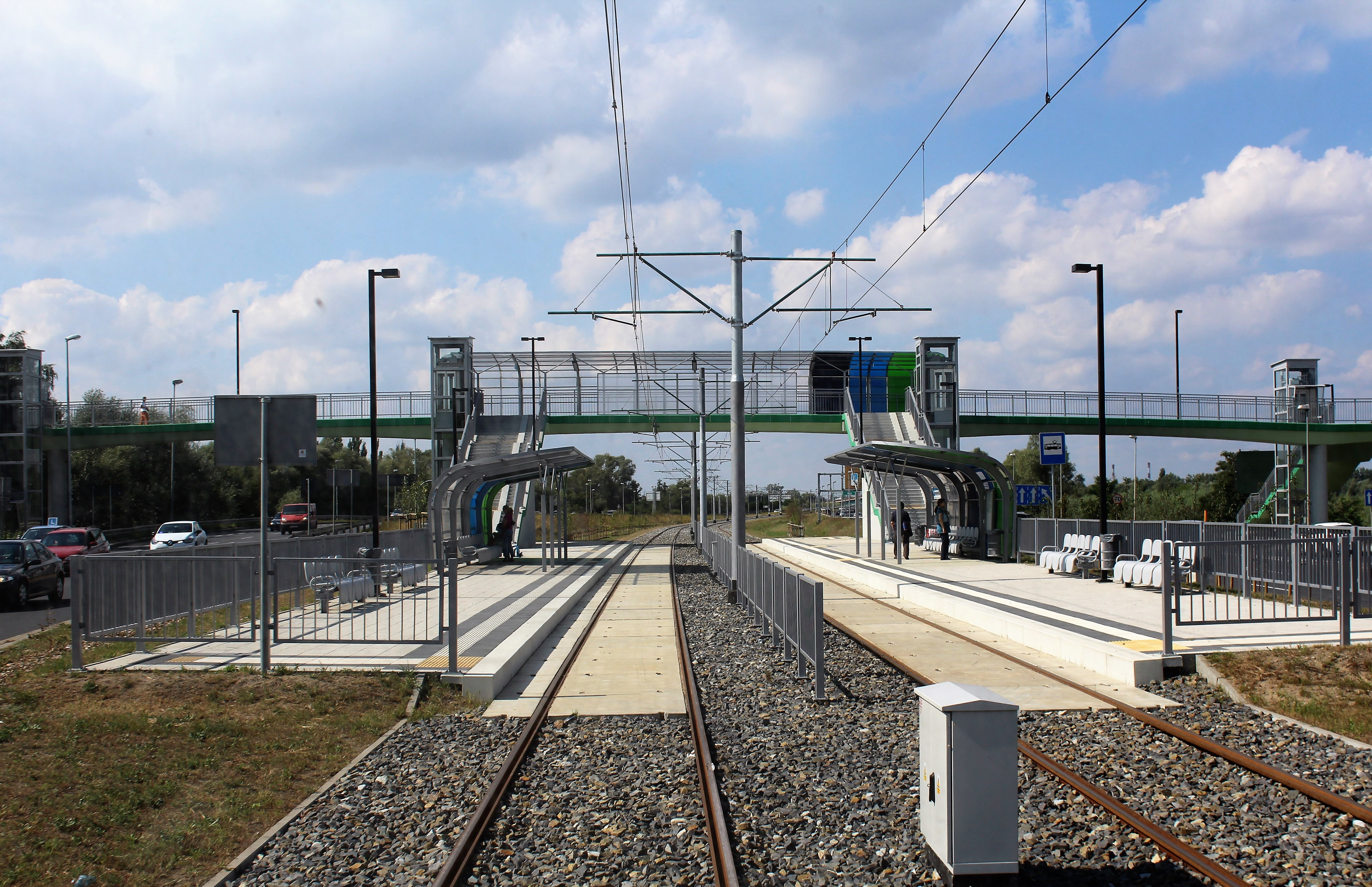 Przystanek tramwajowy Hangarowa w Szczecinie